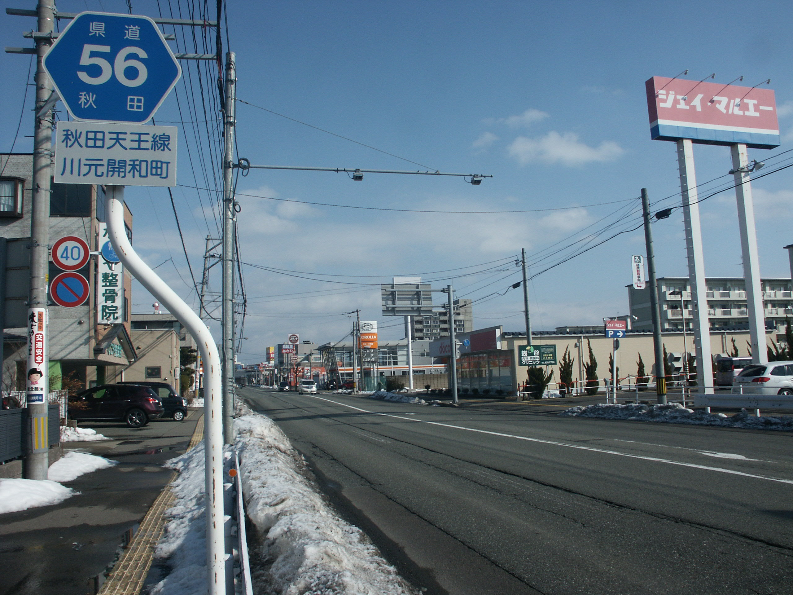 秋田県道56号線秋田市川元開和町付近